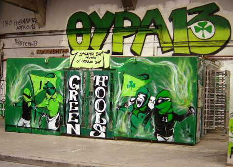 "Gate 13"-Eingang (Westtribüne) des "Apostolos Nikolaidis" - Stadions